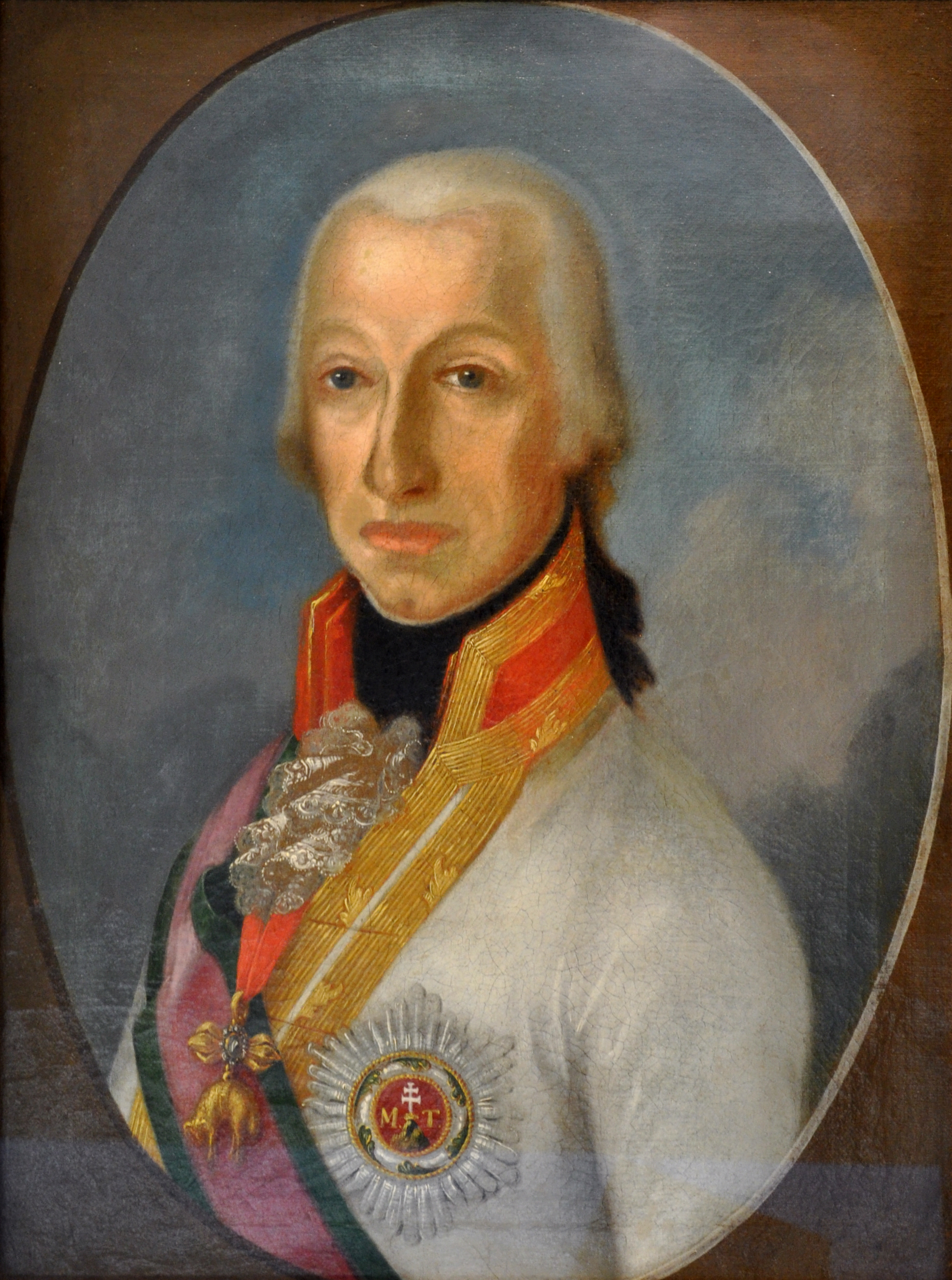 Porträt des Salzburger Kurfürsten Ferdinandlabel QS:Lde,"Porträt des Salzburger Kurfürsten Ferdinand"